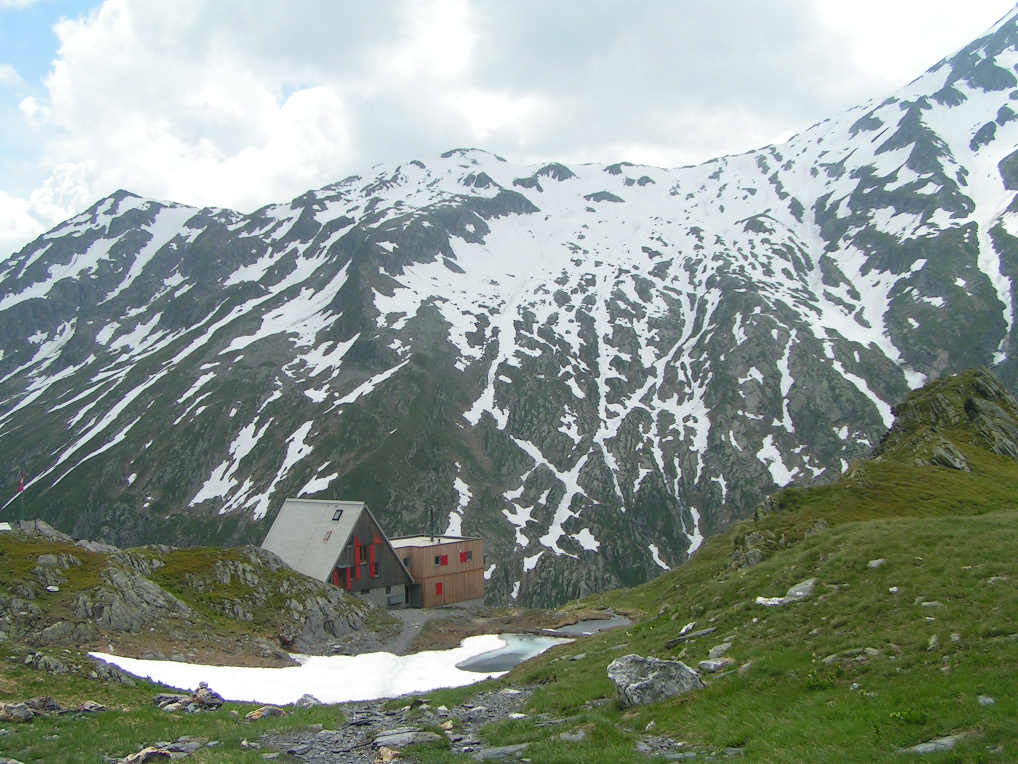 Capanna Scaletta, Ticino, Svizzera - Switzerland